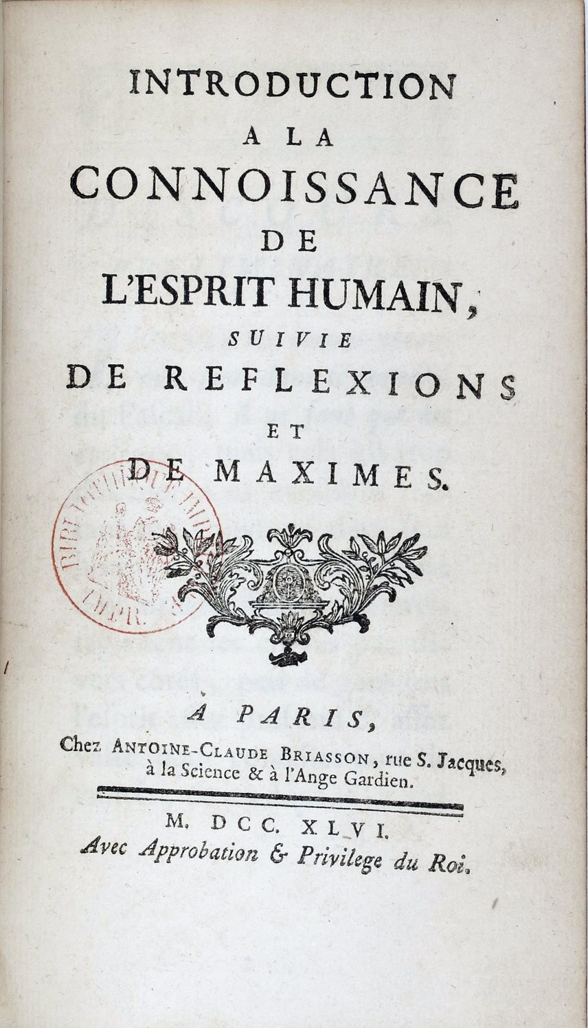 Page de grand titre.